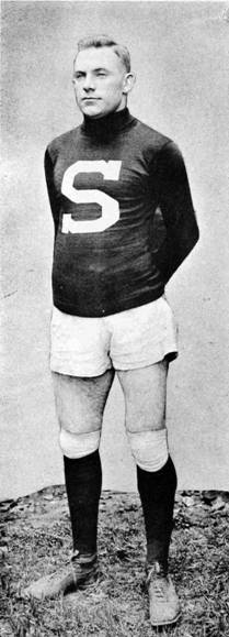 Daniel Carroll en 1917 portant le maillot de l'Université de Stanford.